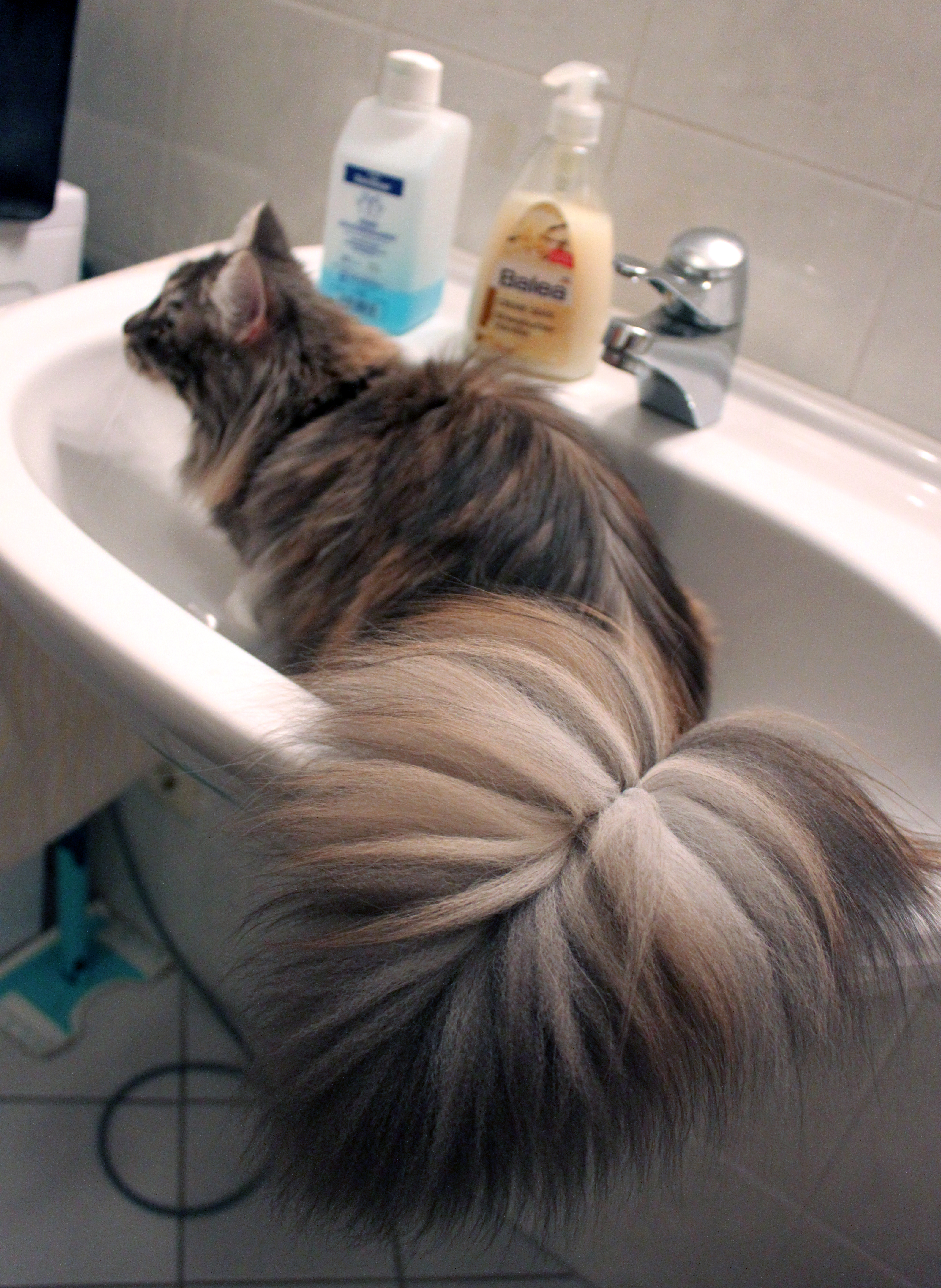 Maine Coon, 9 Monate alt, spielt gerne mit Wasser